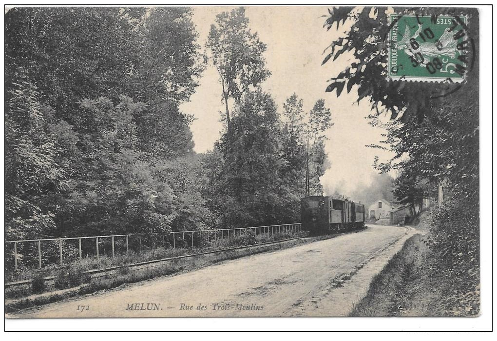 Passage du tramway de Verneuil aux trois-moulins.